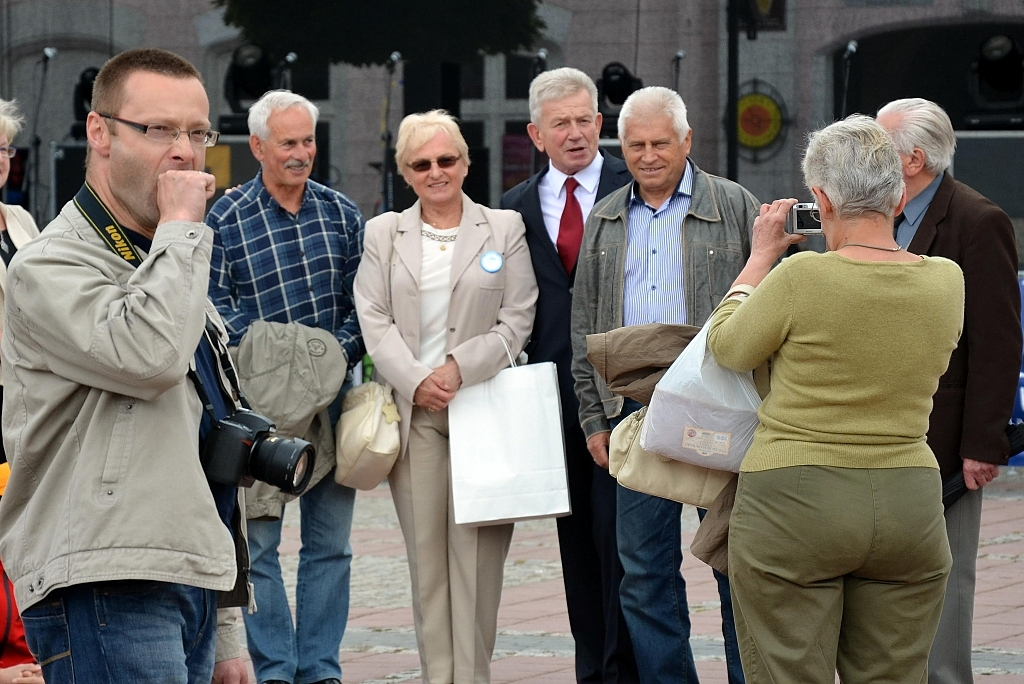 Jan Oklejewicz b. sekretarz gminy Sanok (PZPR), radny miasta Sanoka (SLD) oraz Andrzej Krzanowski b. prezez Autosan ob. Stomil Sanok Dystrybucja (trzeci od lewej)